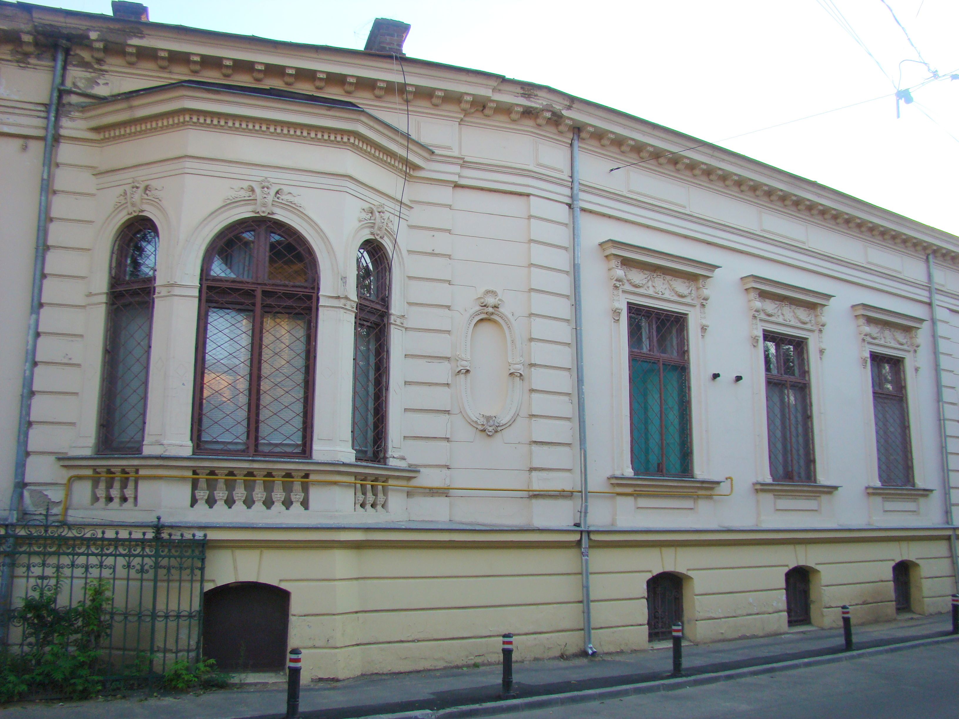 Casă monument istoric, str. Theodor Aman, nr.1